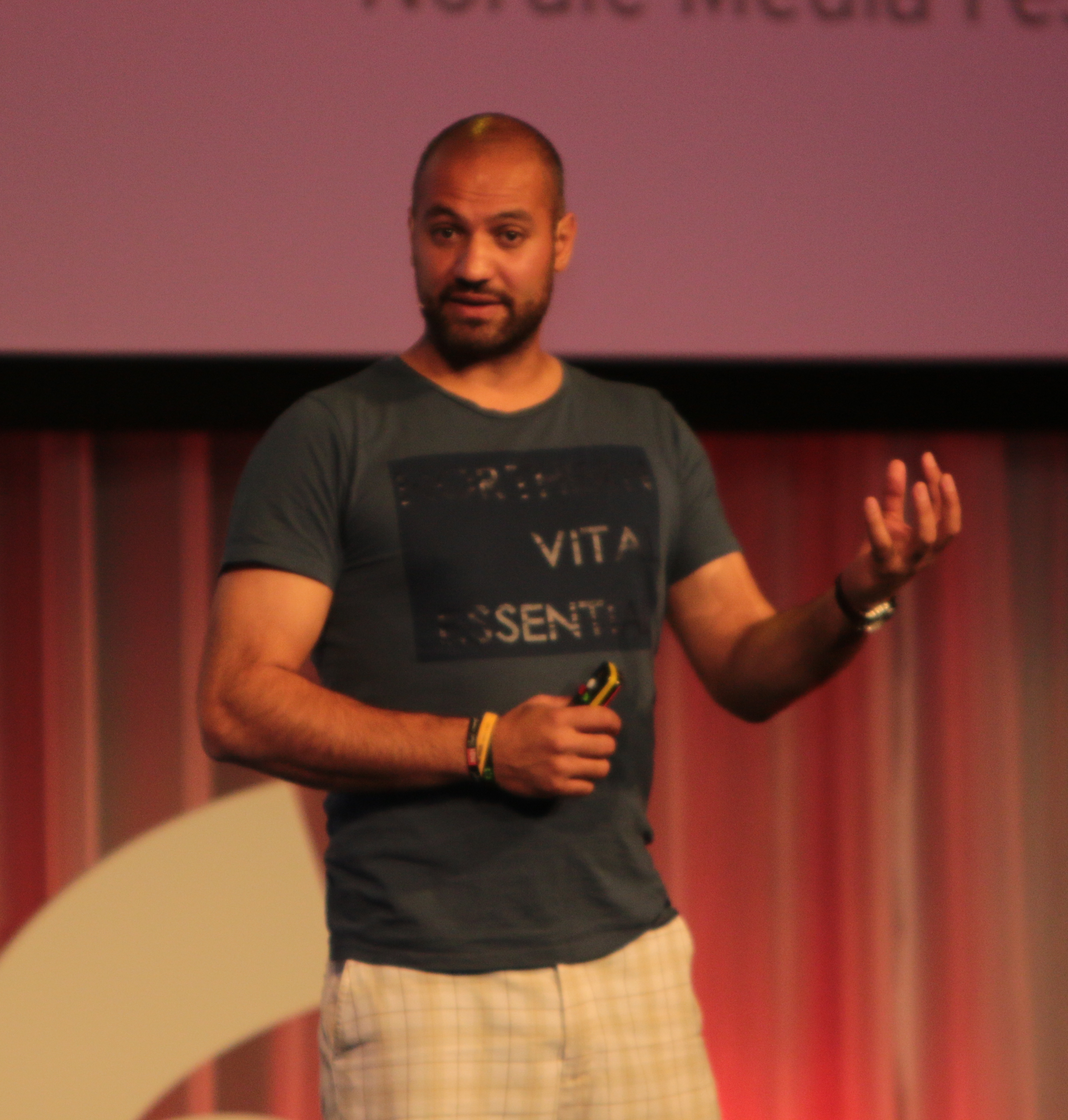 Medvirkende: Marco Elsafadi